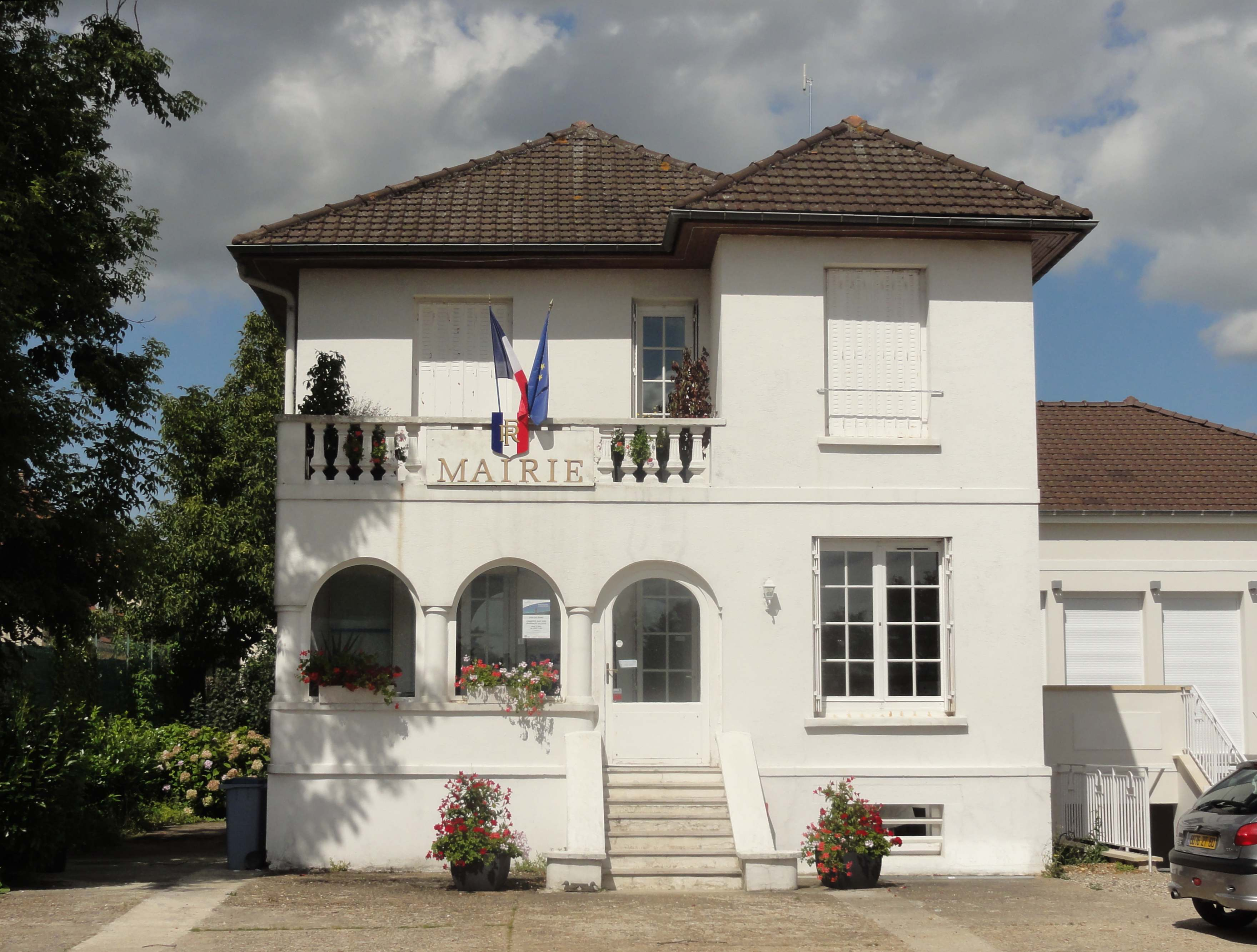 La nouvelle mairie depuis 2012, rue de la Gare, près du carrefour où se situe l'ancienne mairie.